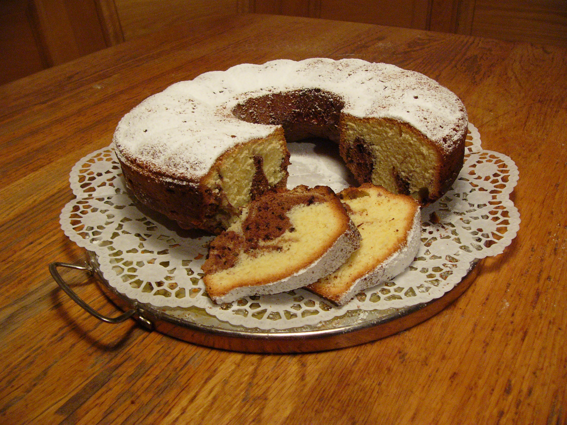 marble cake; Recipe: Marmorkuchen nach den Rezept aus Wikibooks